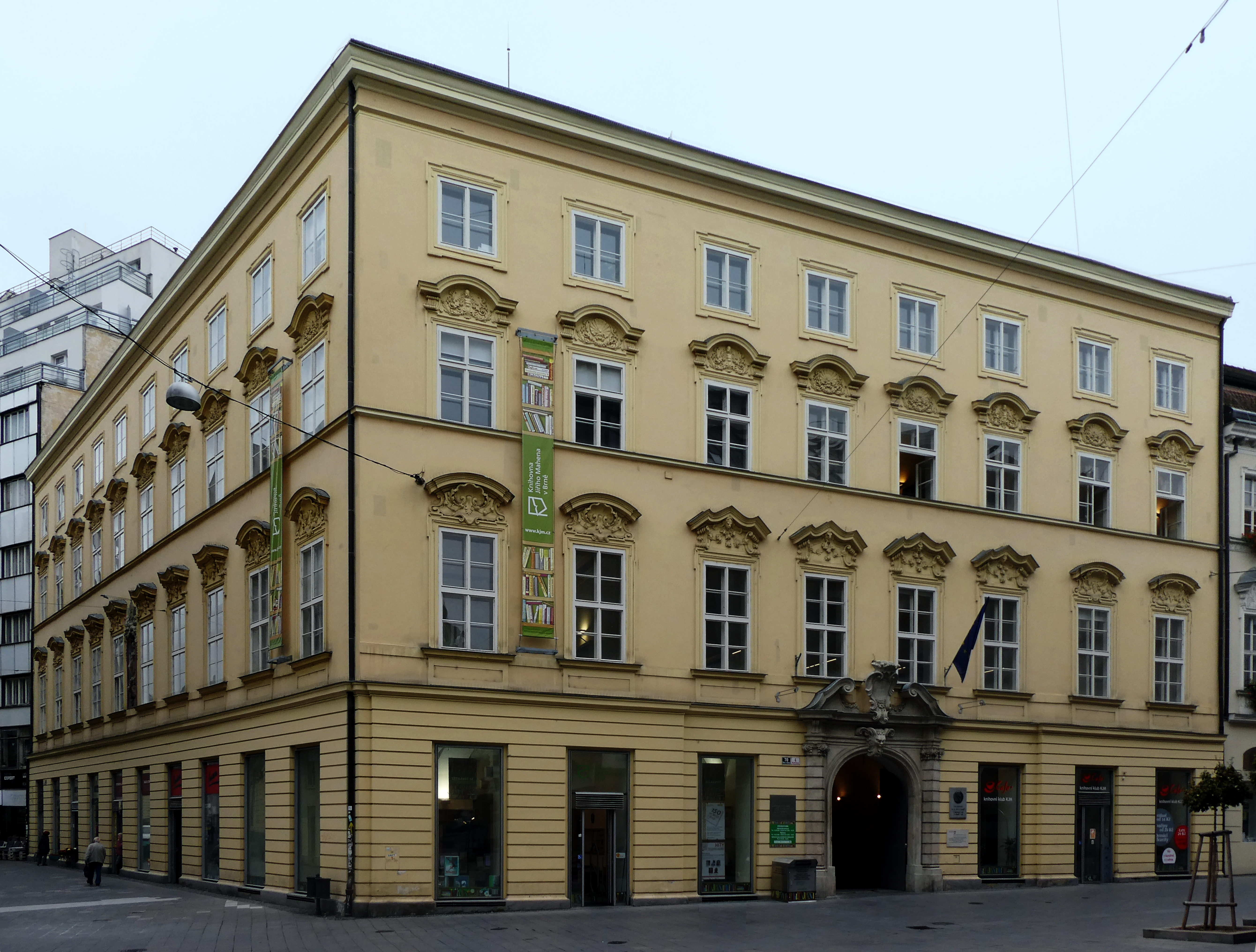 Brno, Schrattenbachův palác, Knihovna Jiřího Mahena.